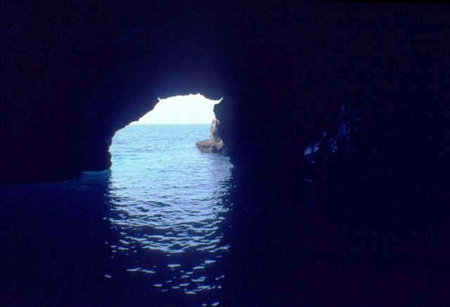 Area Marina Protetta Capo Gallo, Palermo, Sicily Grotta dell'Olio